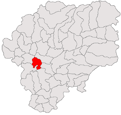 Categorie:Hărţi ale judeţului Bistriţa-Năsăud